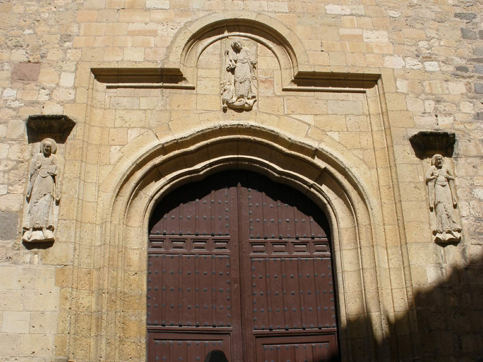 Segovia - Iglesia de San Miguel